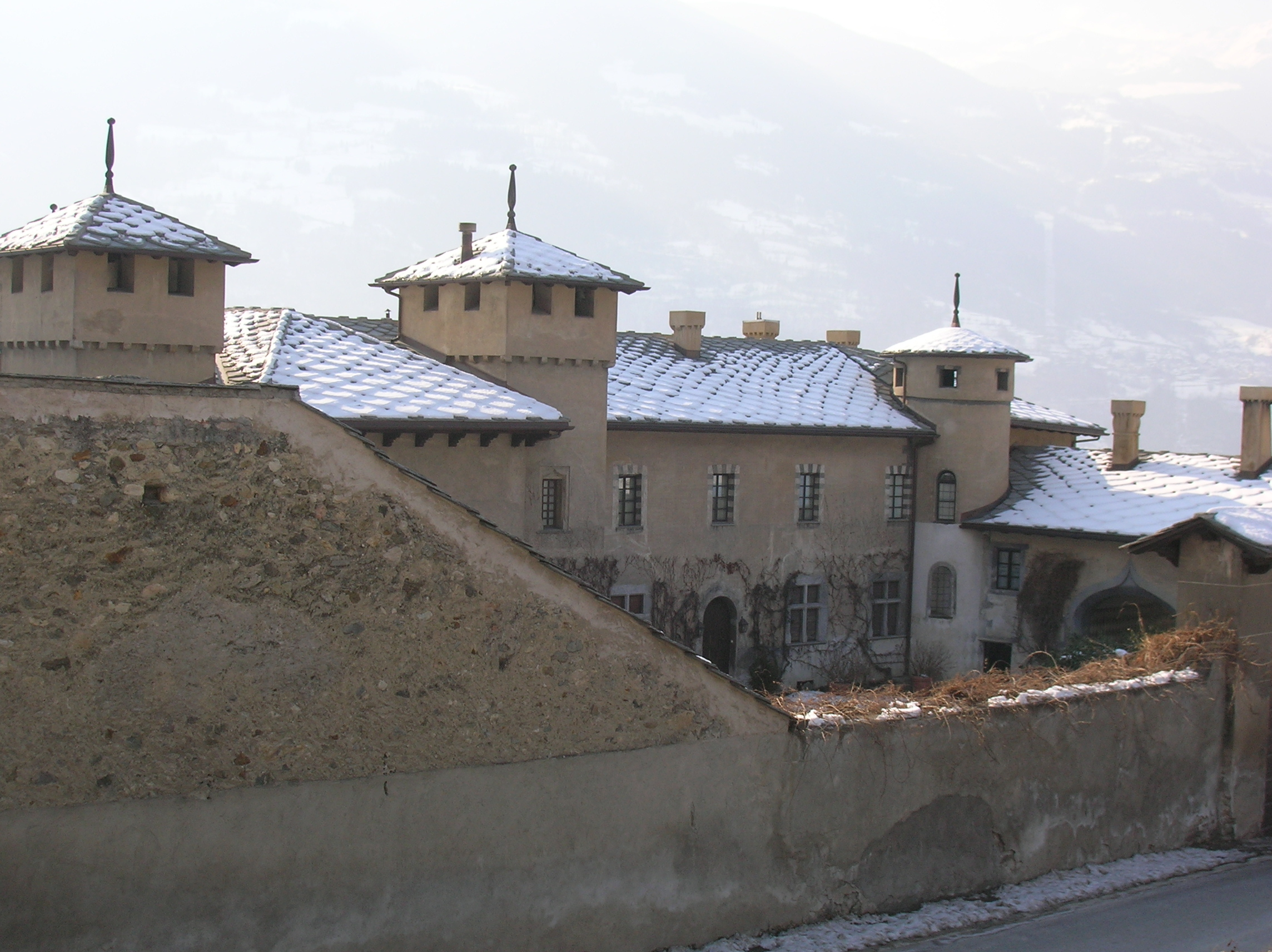 Castello Passerin d'Entrèves a Saint-Christophe, Valle d'Aosta, Italia.